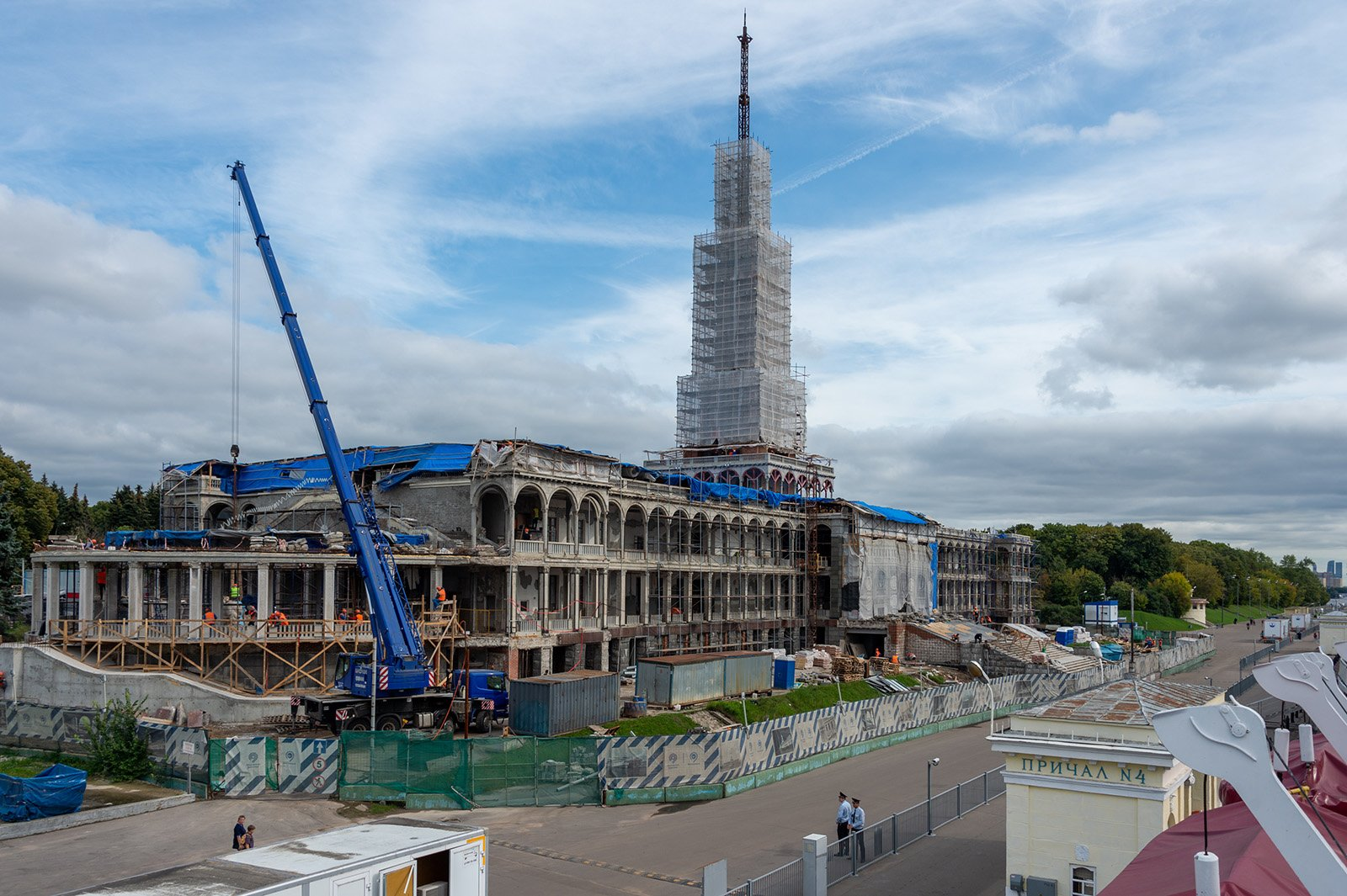 Осмотр хода реставрации Северного речного вокзала (С. Собянин)